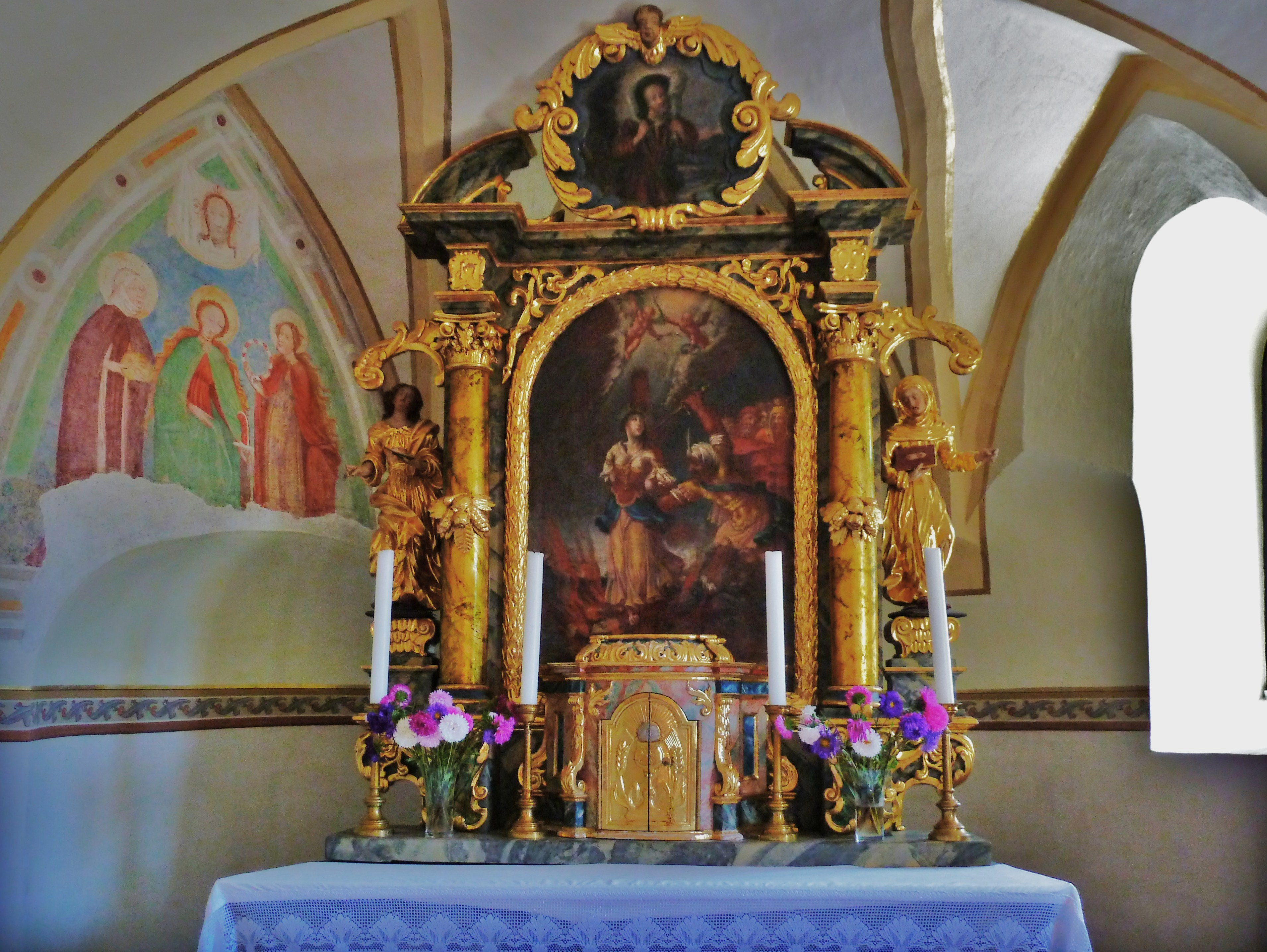 Apsis mit Hauptaltar. Das Altarbild zeigt das Martyrium der hl. Lucia (Agathe?)